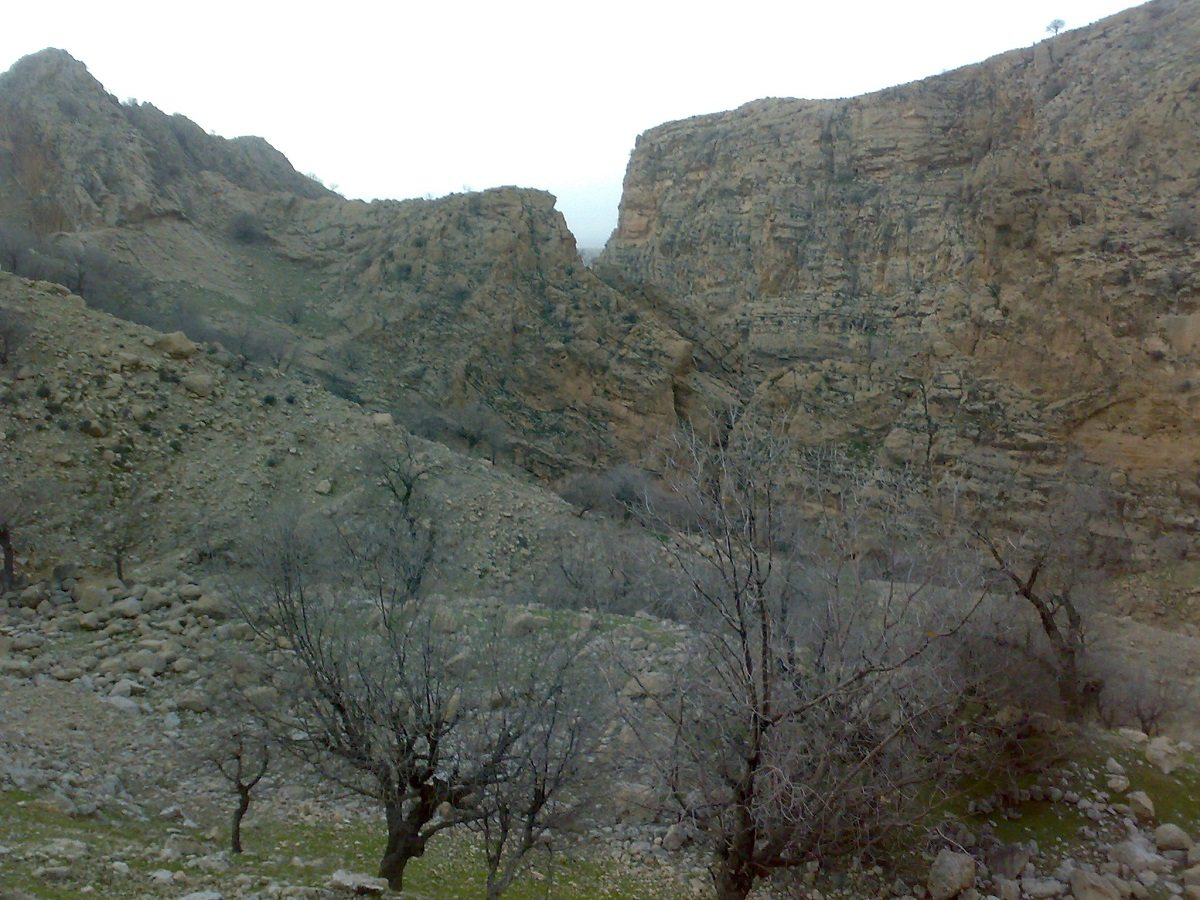 تنگ آمو با ارتفاع 150 متر که آب رودخانه رودنو از آن عبور می کند و به رودخانه بزرگ اعلا می ریز